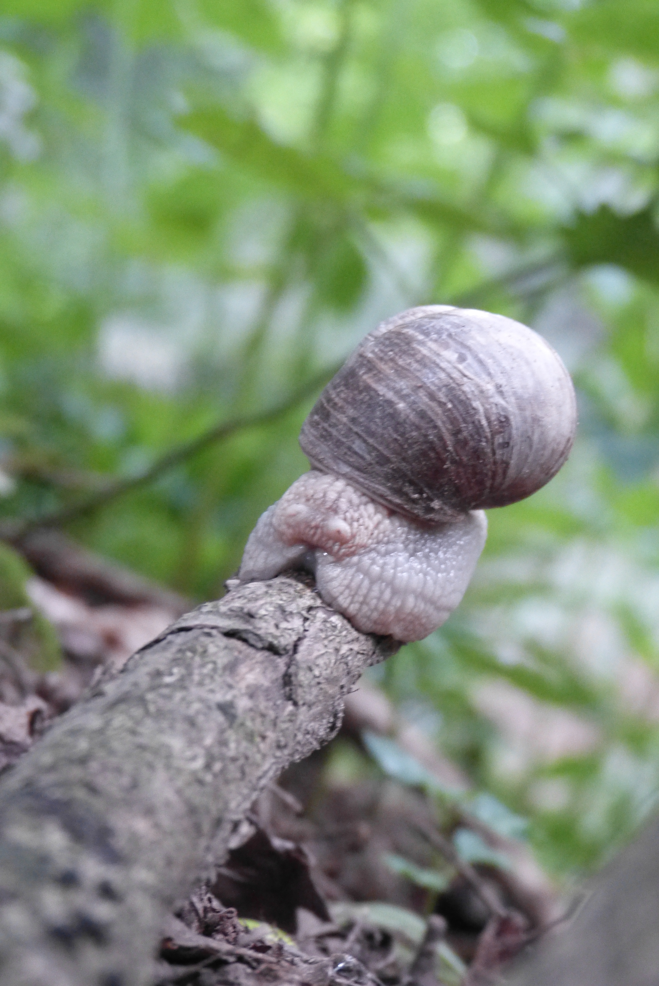 Weinbergschnecke mit "eingezogenen Augen", im Waldstück "Schwäbisches Himmelreich" bei Hainhofen (Neusäß).